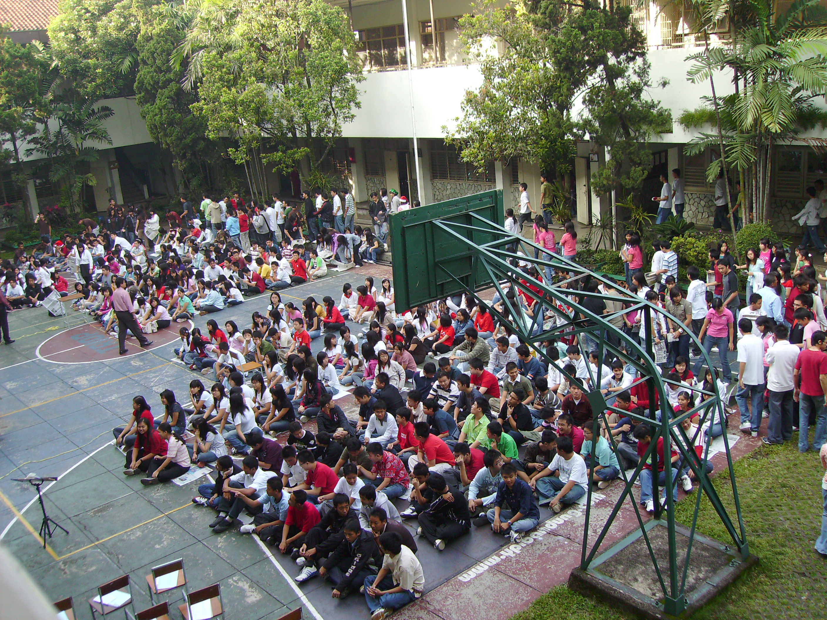 Perayaan Natal bersama SMA Trinitas tahun 2008